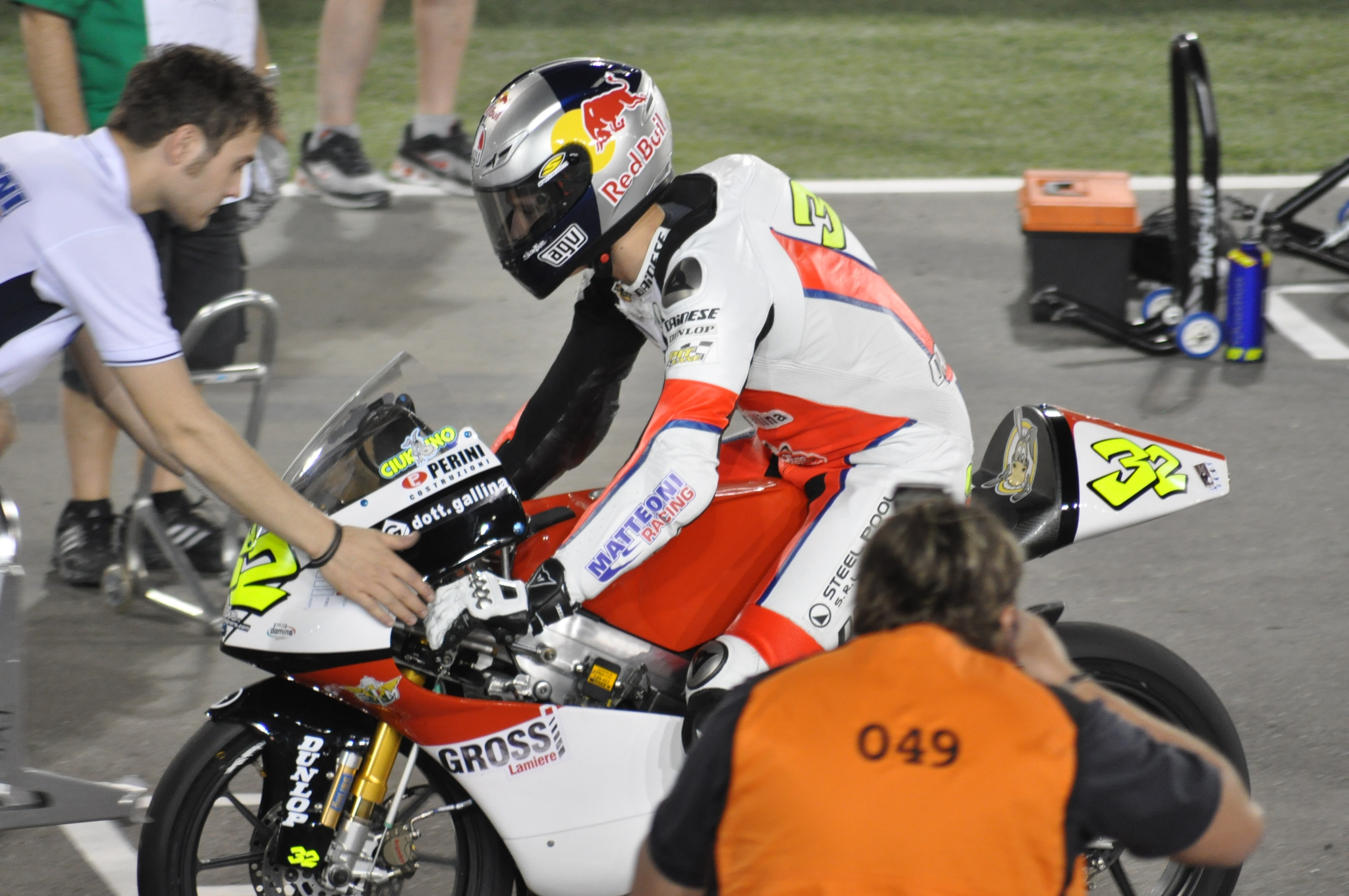 Lorenzo Savadori a Losail nel 2010.